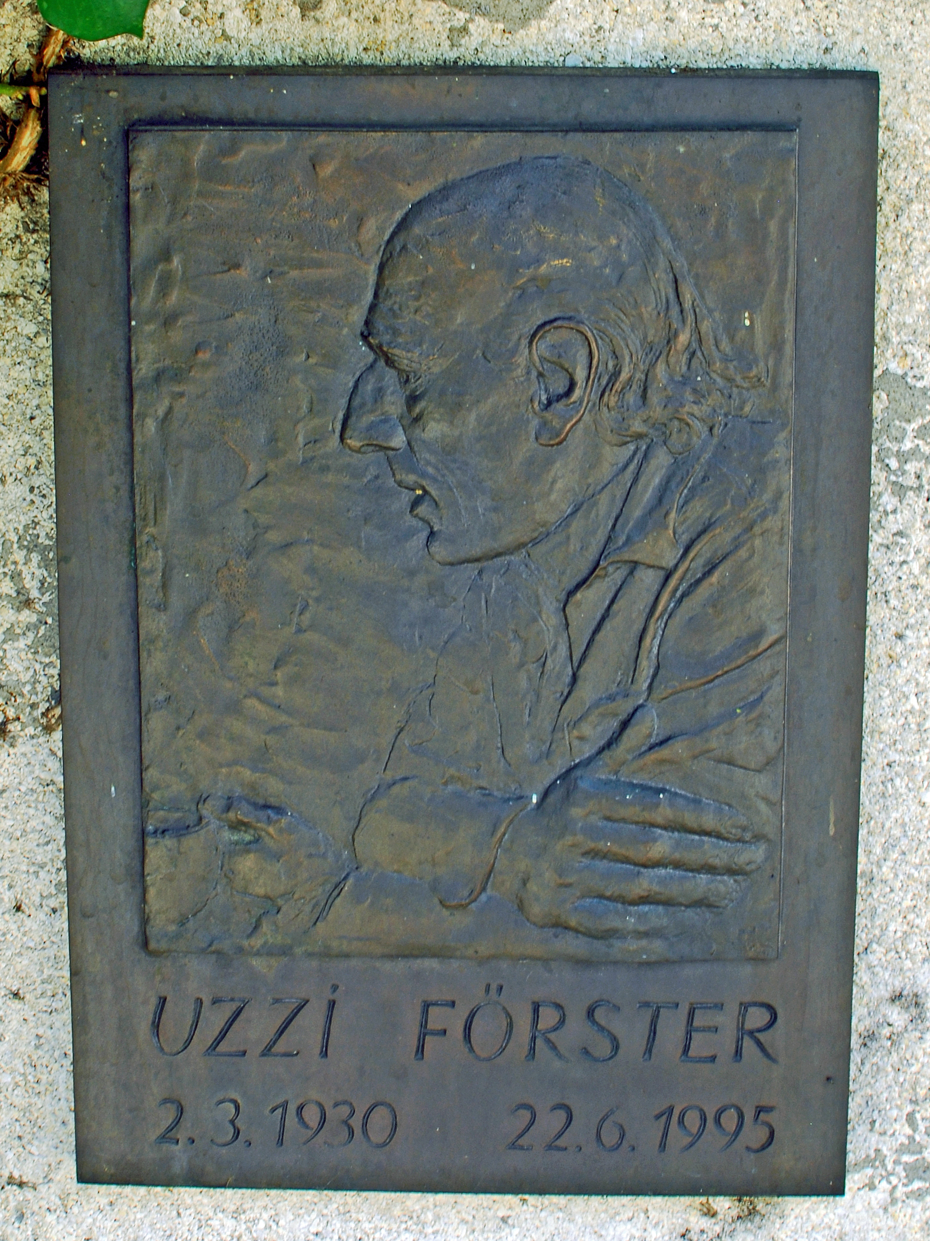 Uzzi Förster Jazzer